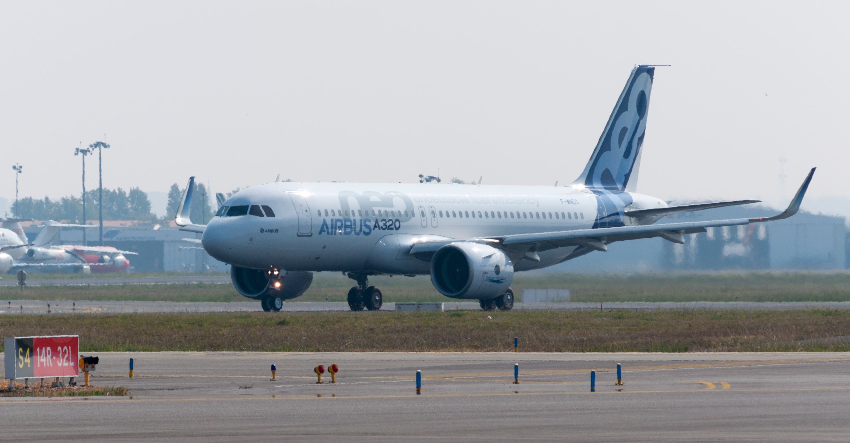 Premier vol de l'A320neo depuis le site Airbus; aéroport international Toulouse Blagnac.